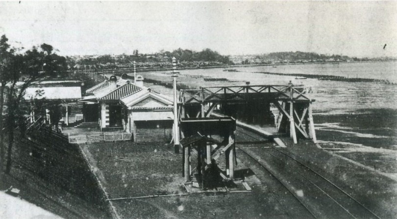 明治時代初期の品川駅。